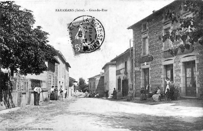 Faramans (Isère, France) la Grande Rue.